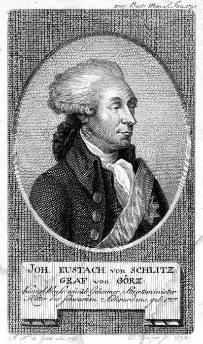 Johann Eustach von Görtz, preußischer Diplomat